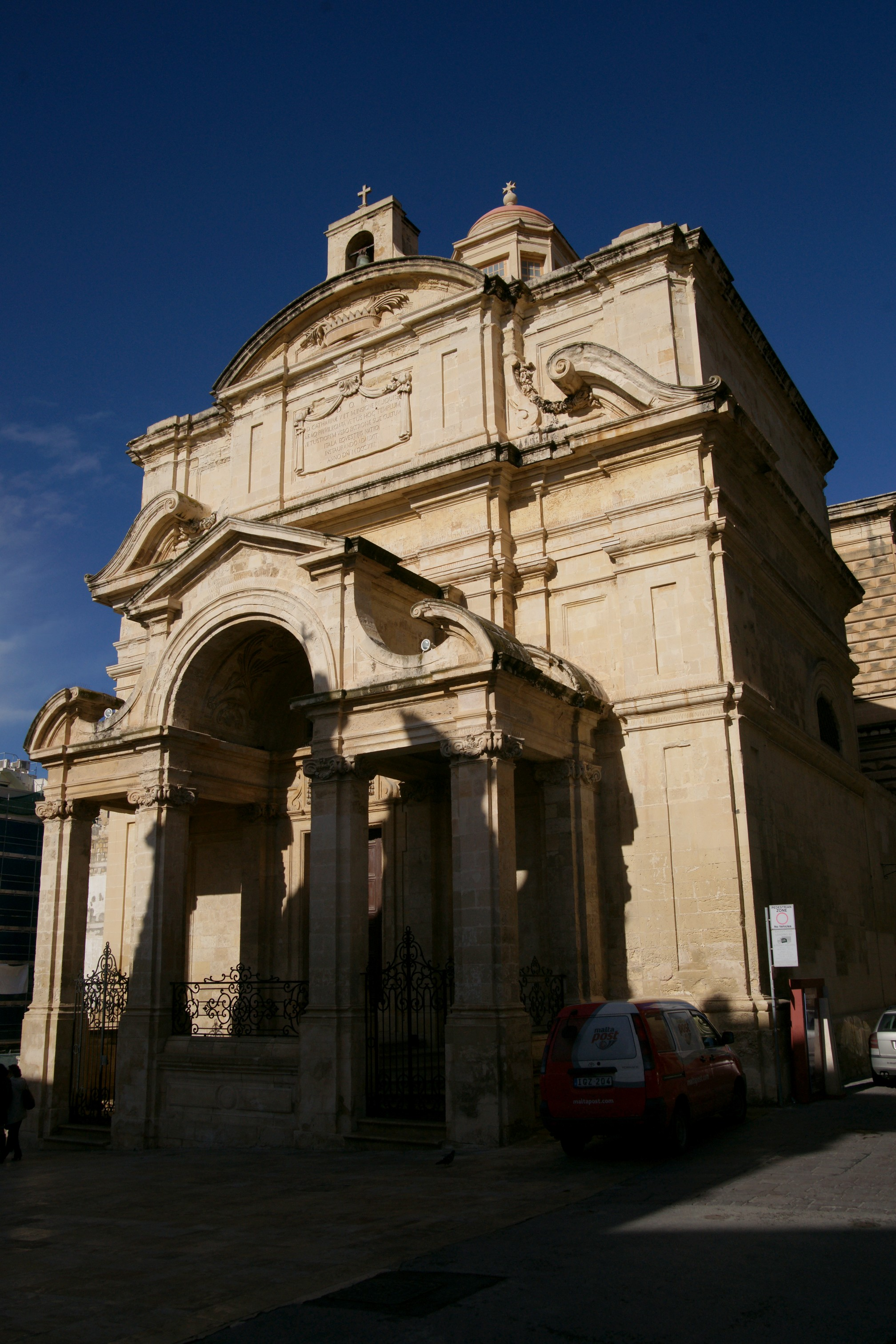 Valletta: Saint Catherine Church